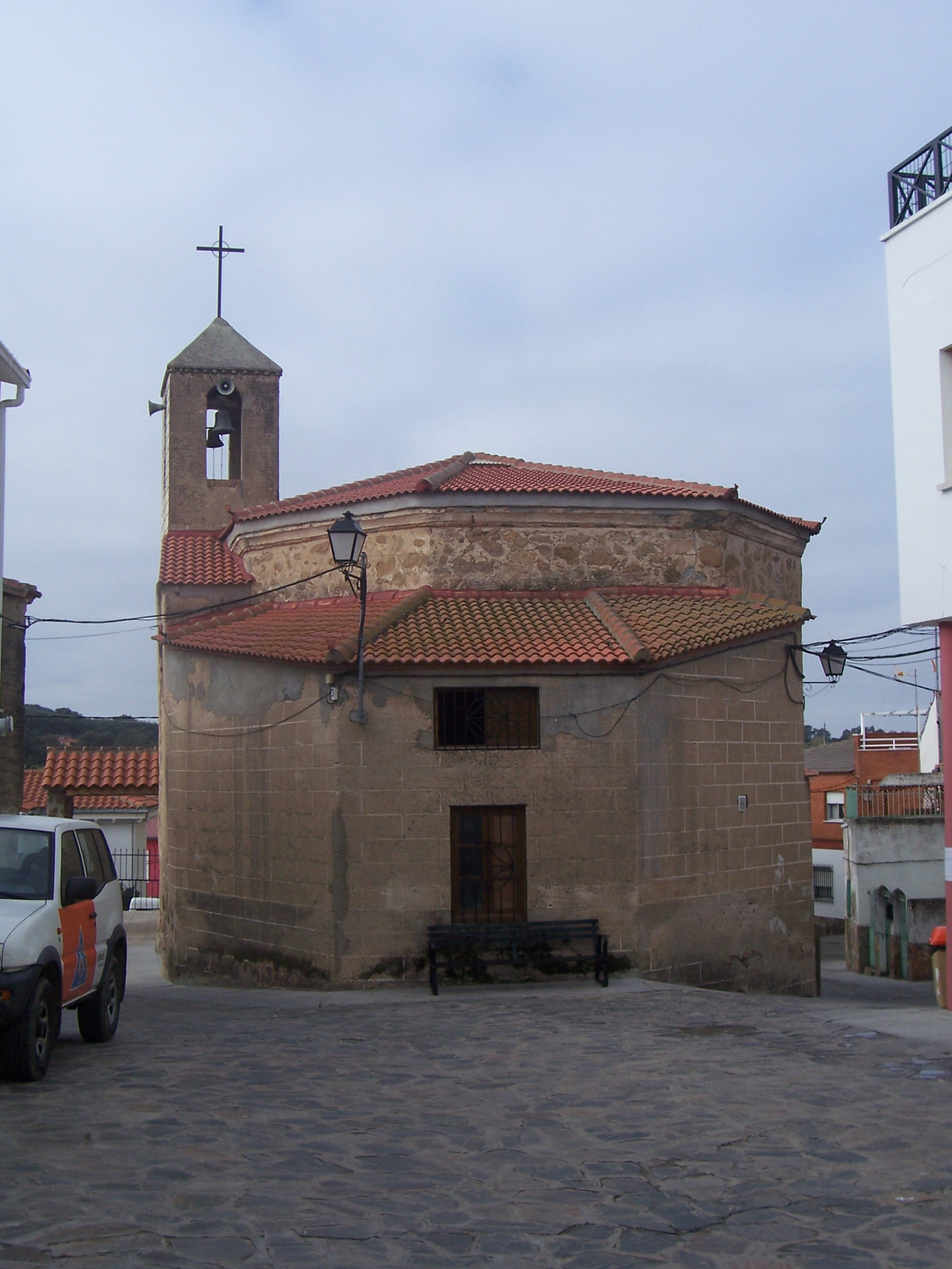 Iglesia de Millanes, provincia de Cáceres, España.